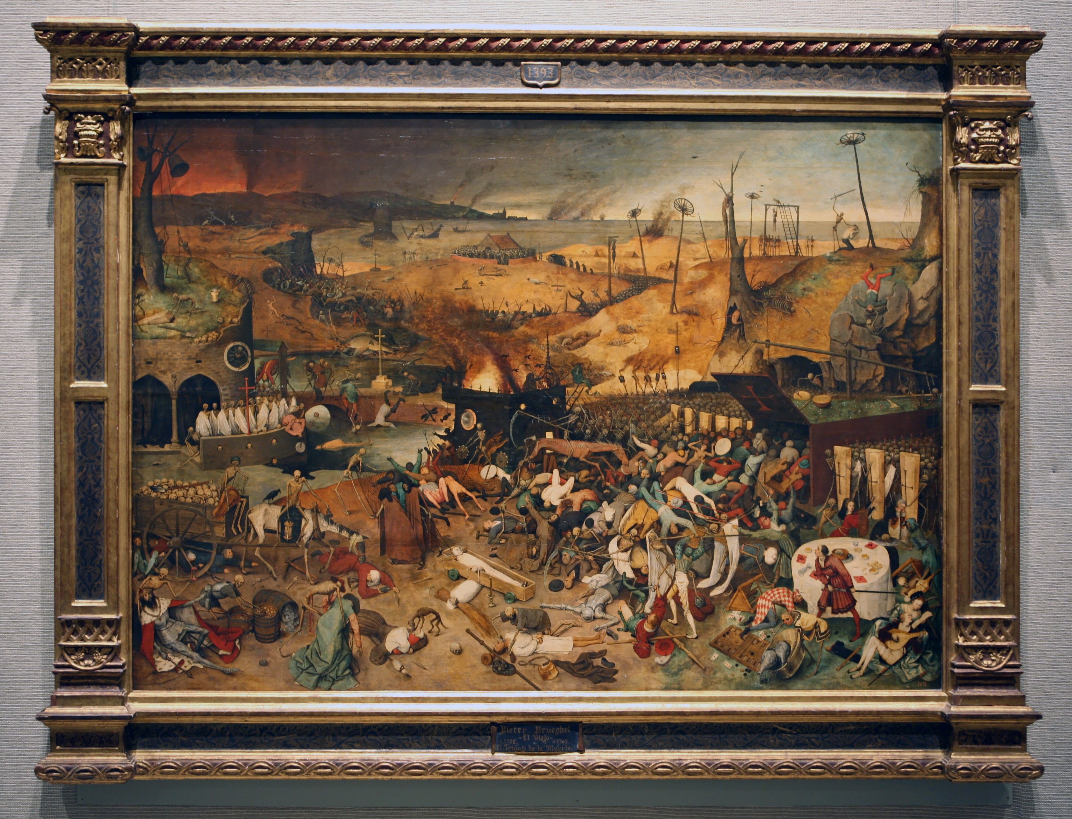 Das Gemälde Triumph des Todes von Pieter Bruegel dem Älteren im Museo del Prado